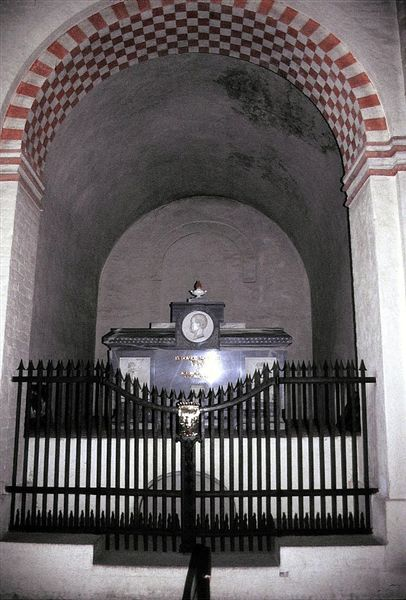 Sorø Klosterkirke